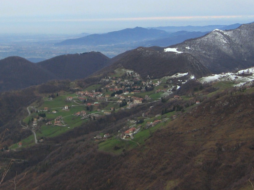 Vista di Monte di Nese, fraz. di Alzano Lombardo (BG).